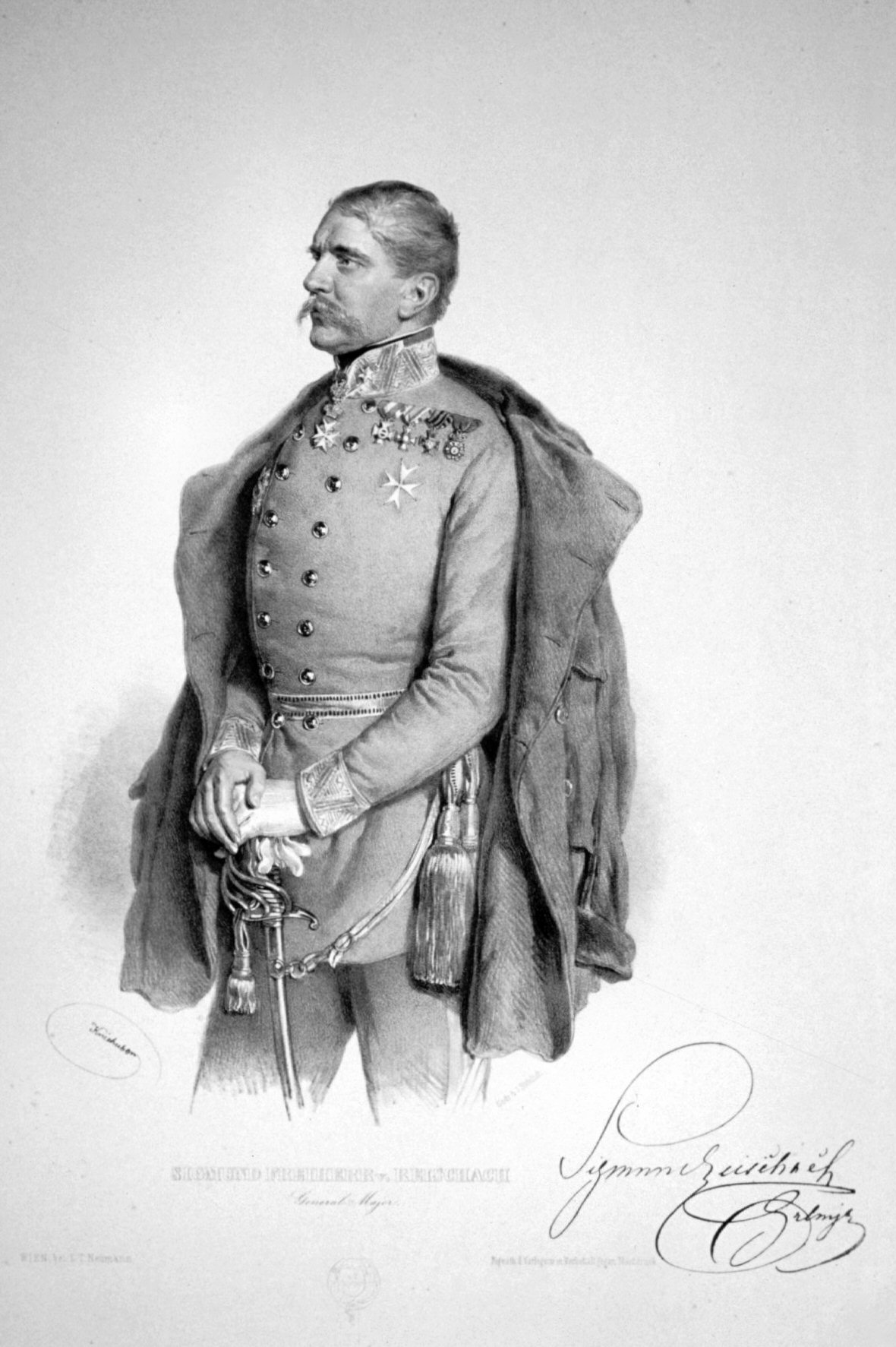 Sigmund Freiherr von Reischach (1809-1878), k. k. Feldzeugmeister. Lithographie von Josef Kriehuber, 1850